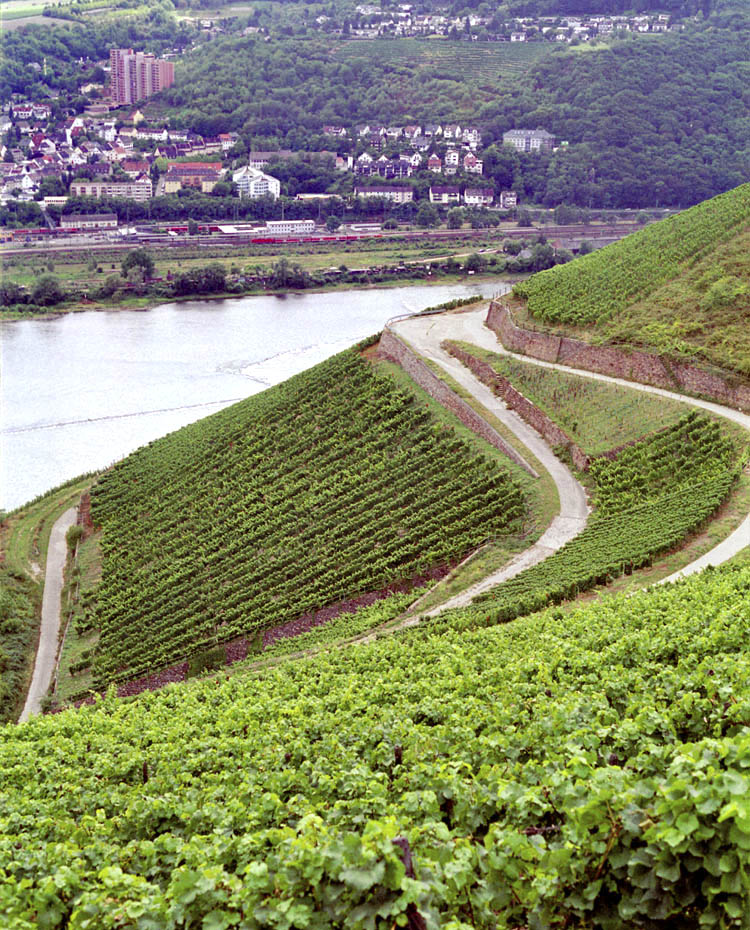 Rüdesheimer Berg Schlossberg, Rüdesheim, Germany